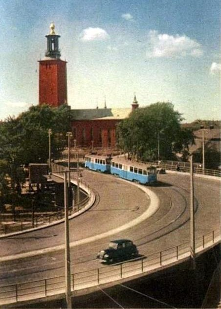 Tegelbacksviadukten, omkring 1950.